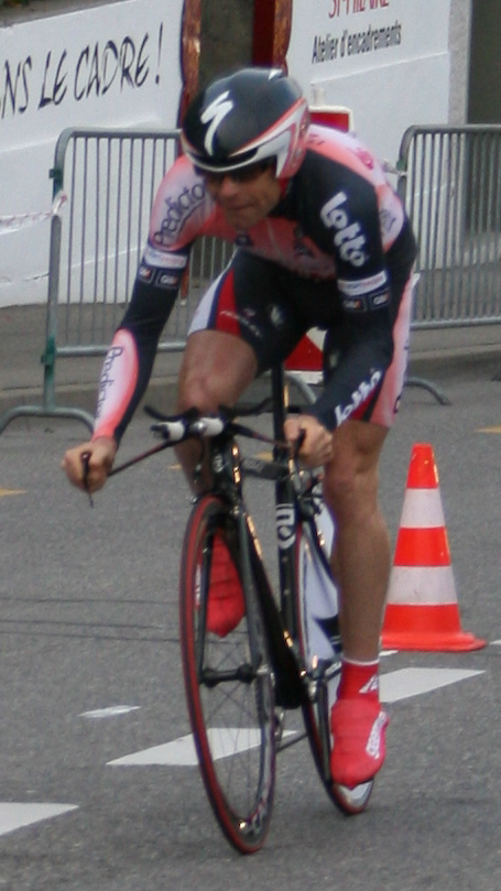 Cadel_Evans prologue du Tour de Romandie 2007